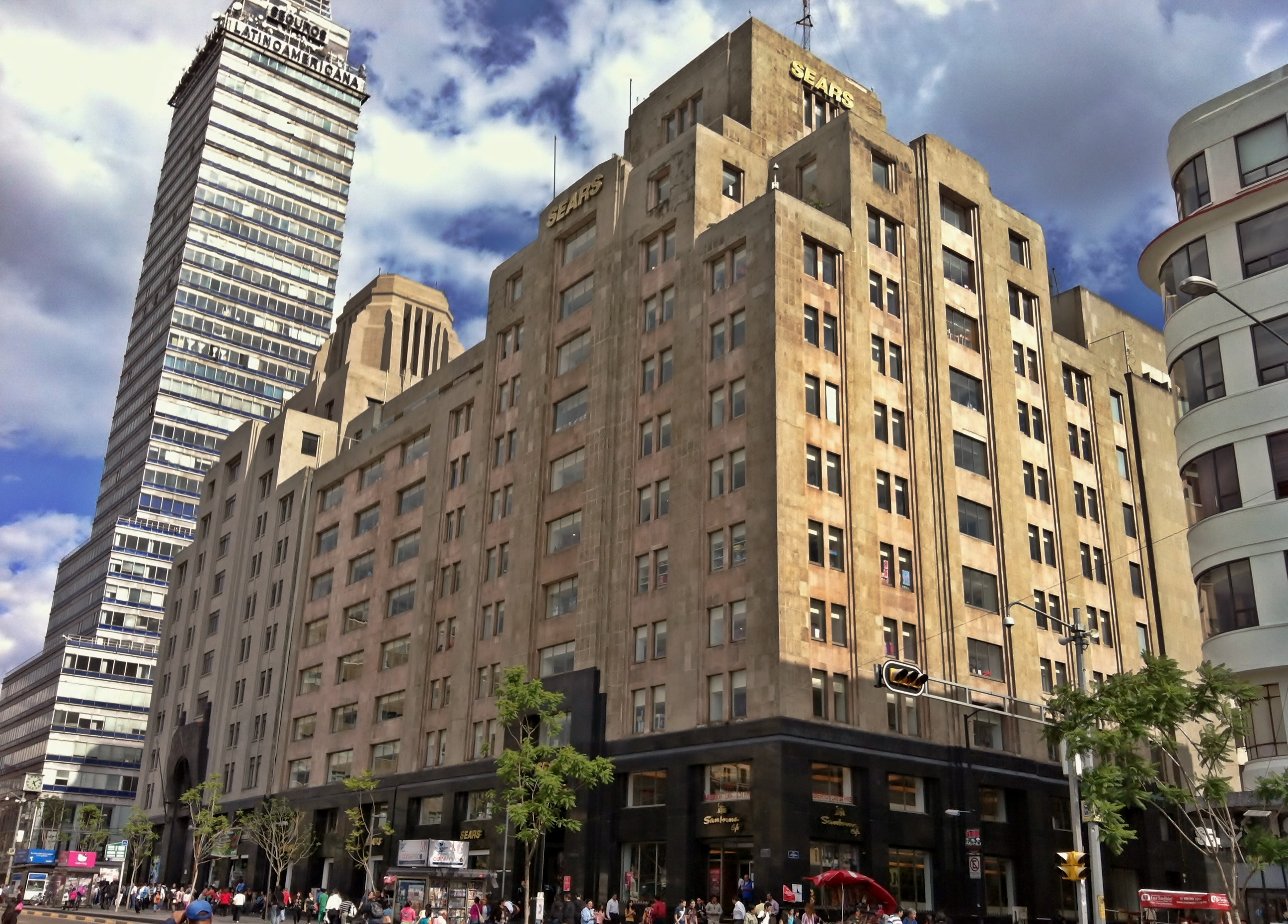 Sears Centro Historico